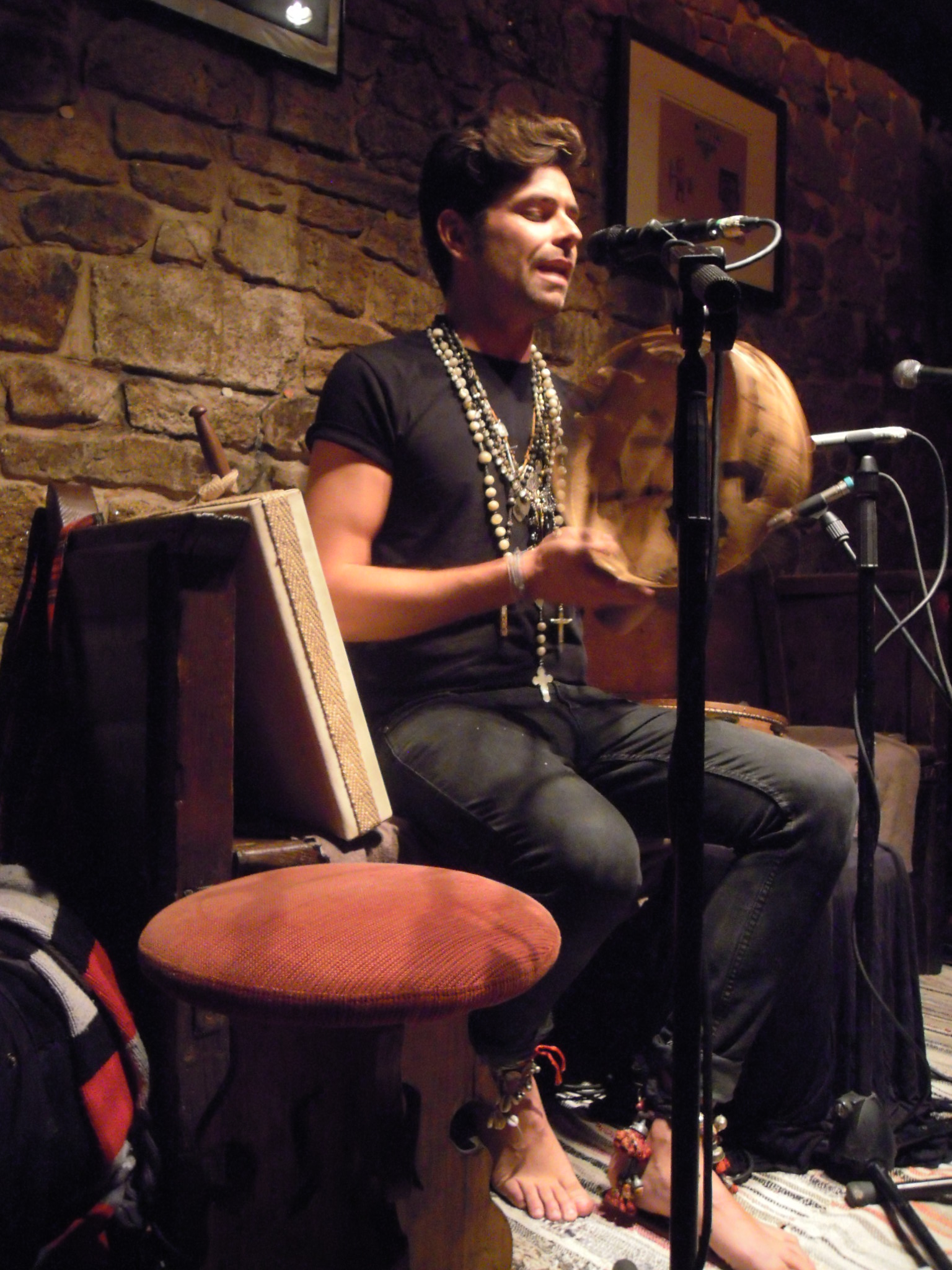 Davide Salvado na Casa das Crechas de Santiago de Compostela